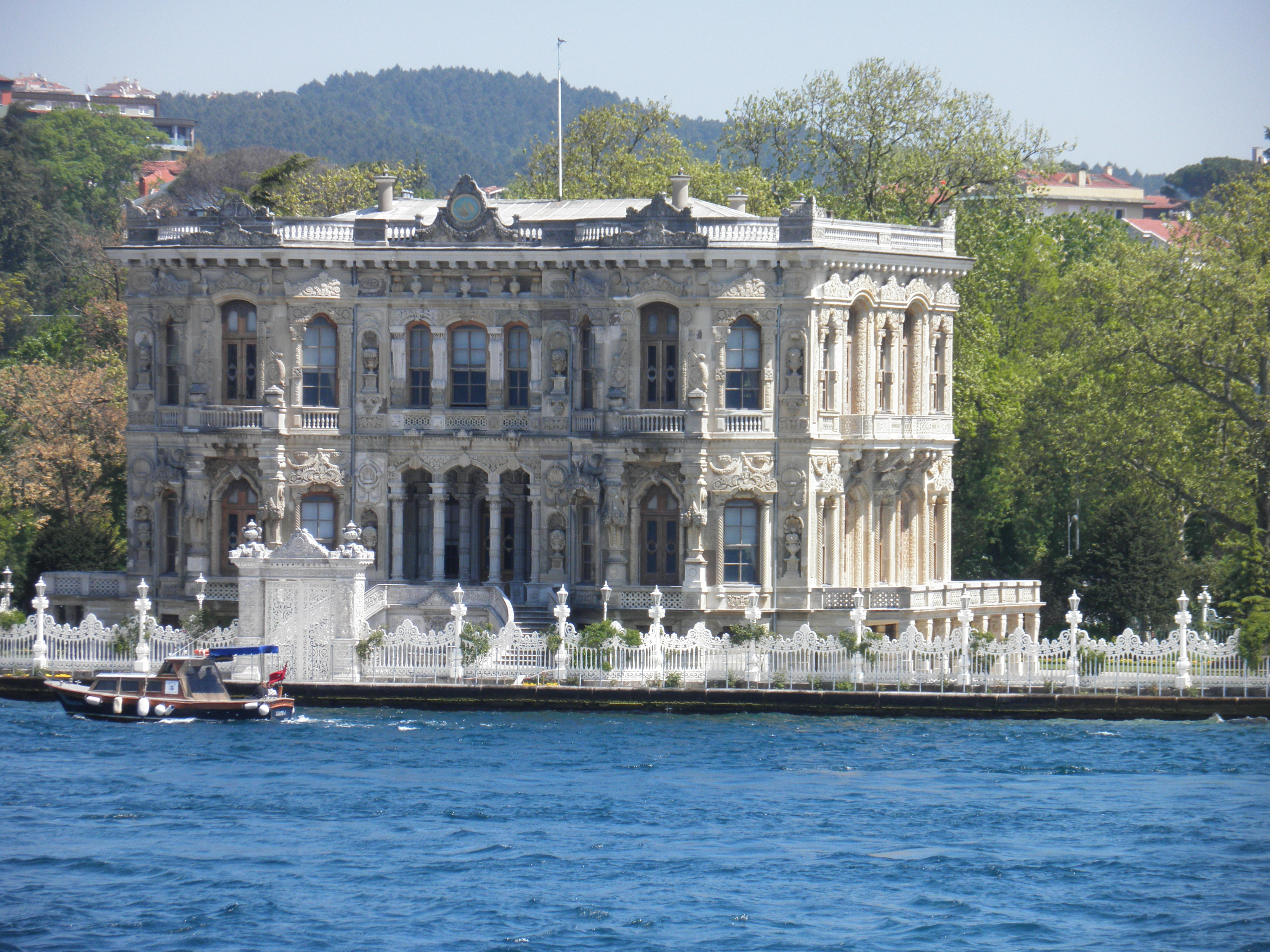 Beylerbeyi Sarayı